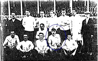 The Argentina national football team during the "Copa Centenario de la Revolución de Mayo", the first tournament held in South America.